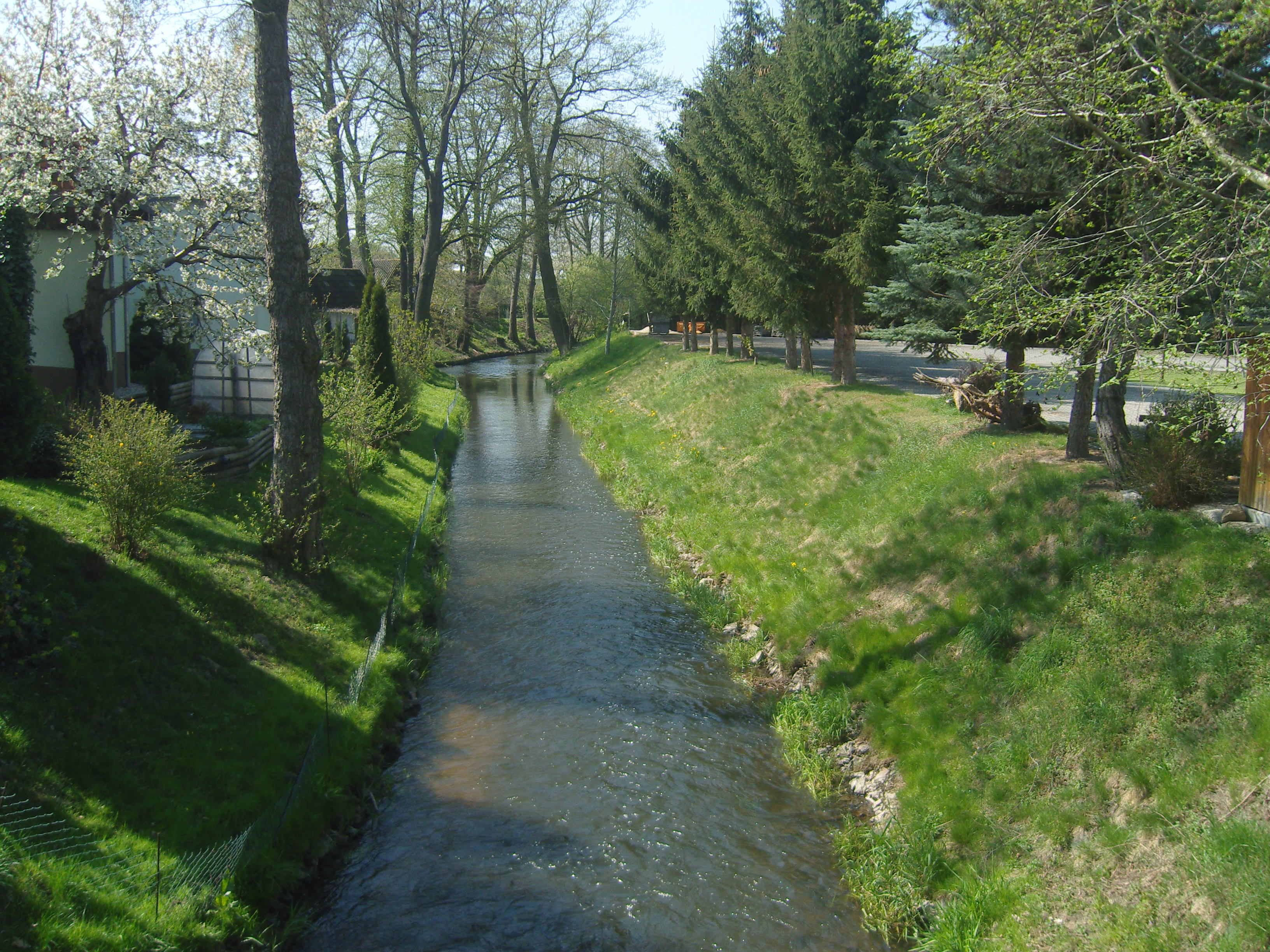 Pulsnitz zwischen Heinersdorf (links im Bild) und Kroppen (rechts im Bild); Heinersdorf liegt im Schraden, Kroppen in der Lausitz; links mündet der Kieperbach in die Pulsnitz